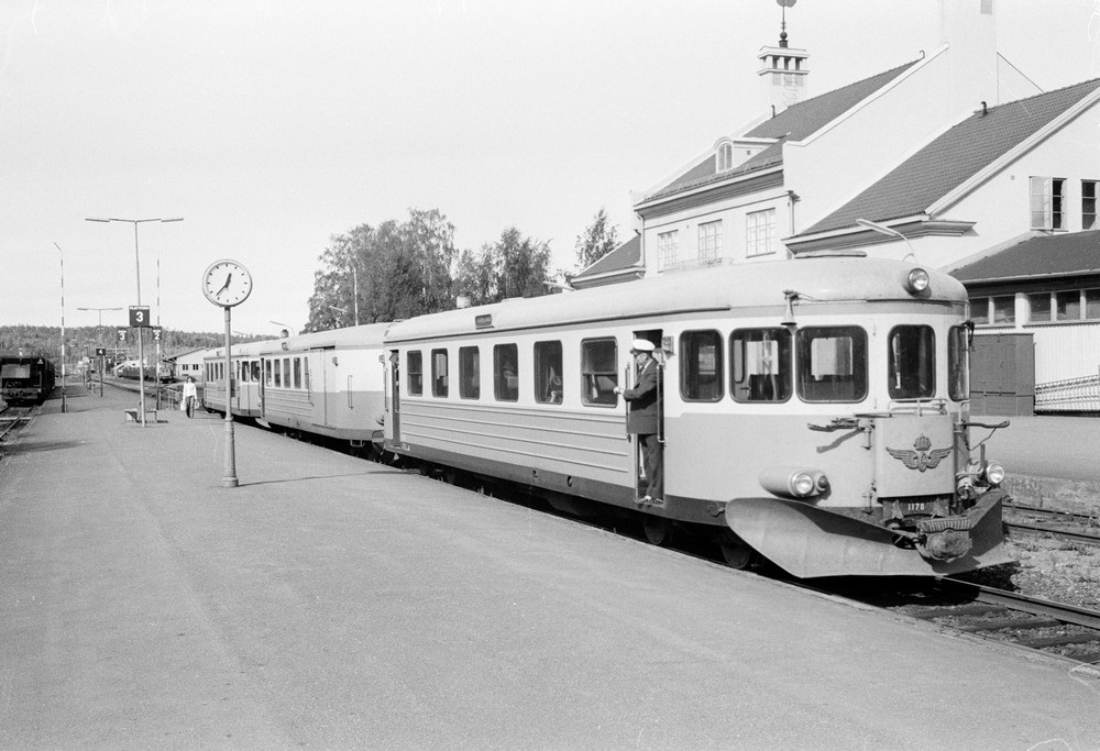 Rättviks station